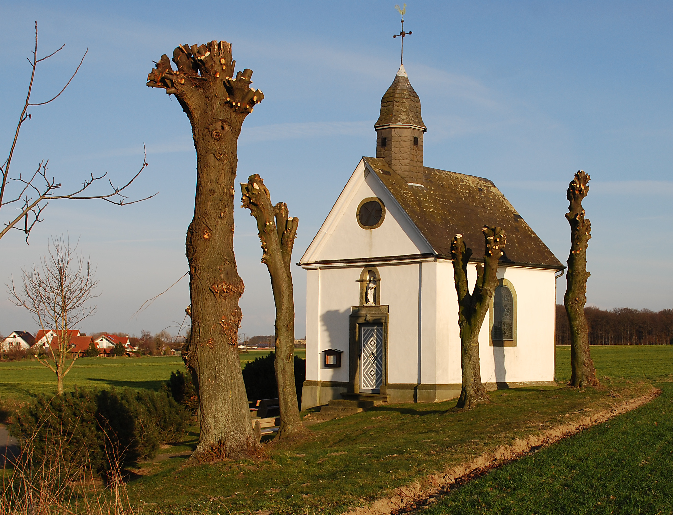 Barockkapelle St. Anna an der Nordwalder Straße im Ortsteil Nordwald in der Gemeinde Lippetal im Kreis Soest in Nordrhein-Westfalen This is a photograph of an architectural monument.